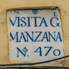 Calle de Andrés Borrego, Madrid, España.